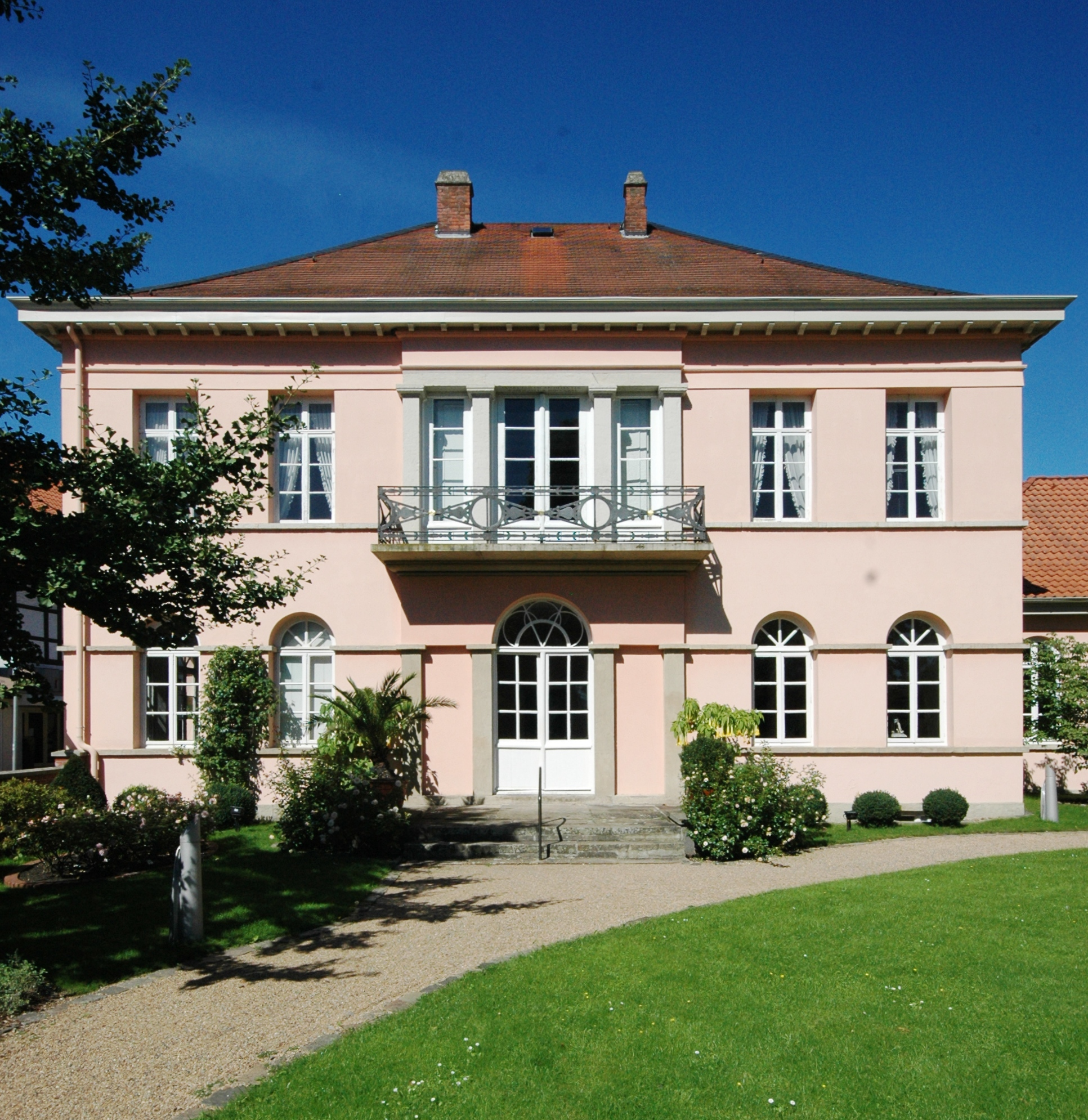 Seitenansicht